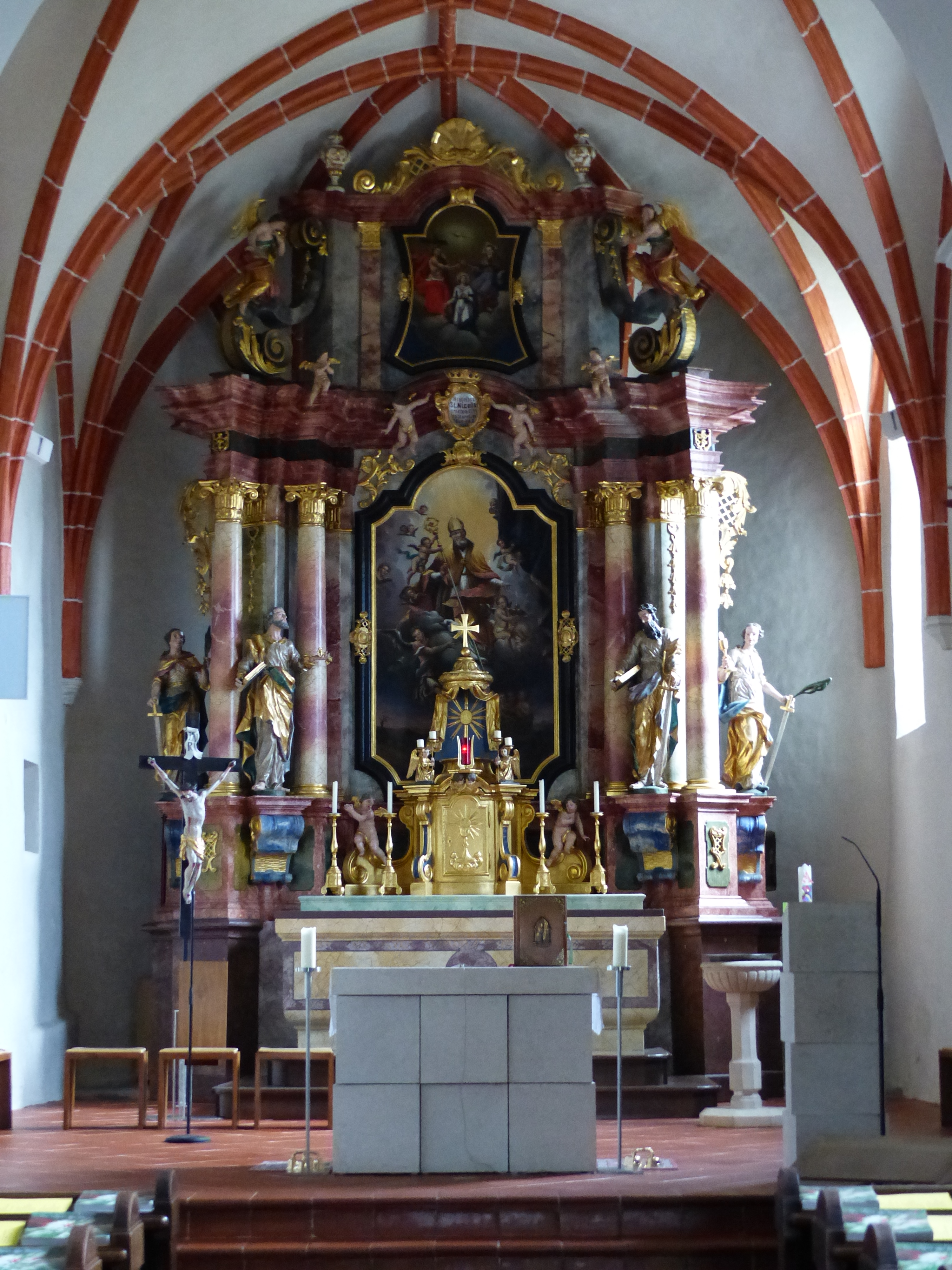 Innenbereich Nikolauskirche Neumarkt im Tauchental